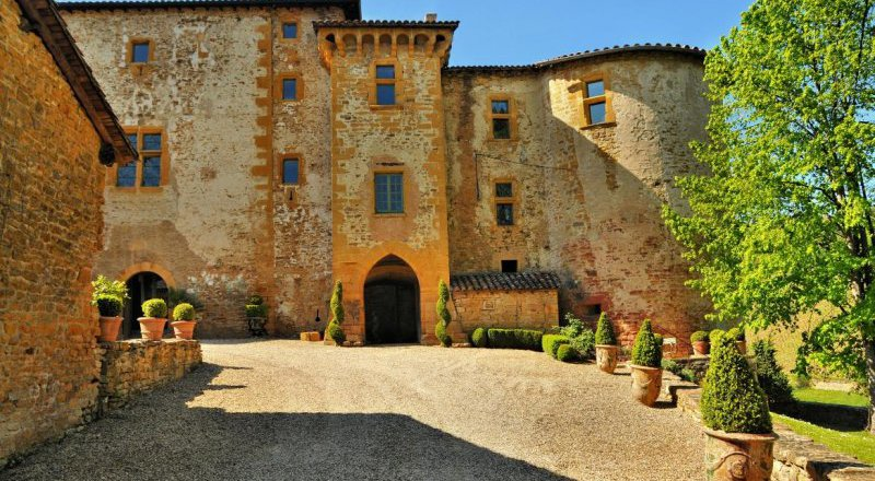 facade avant